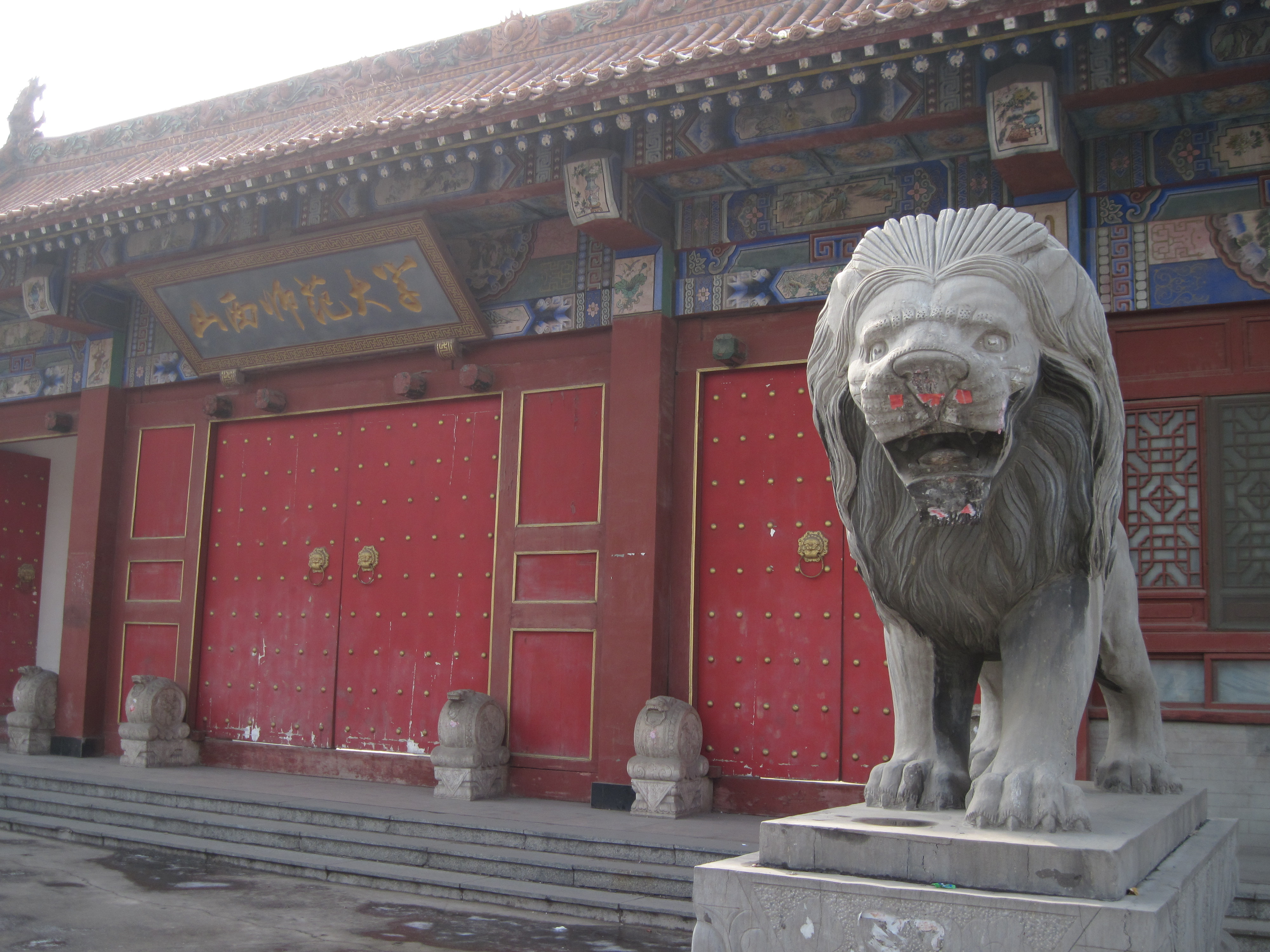 山西师大北门